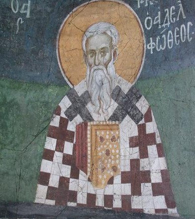 Jakov brat Gospodnji. Mural u manastiru Gračanica na Kosovu.